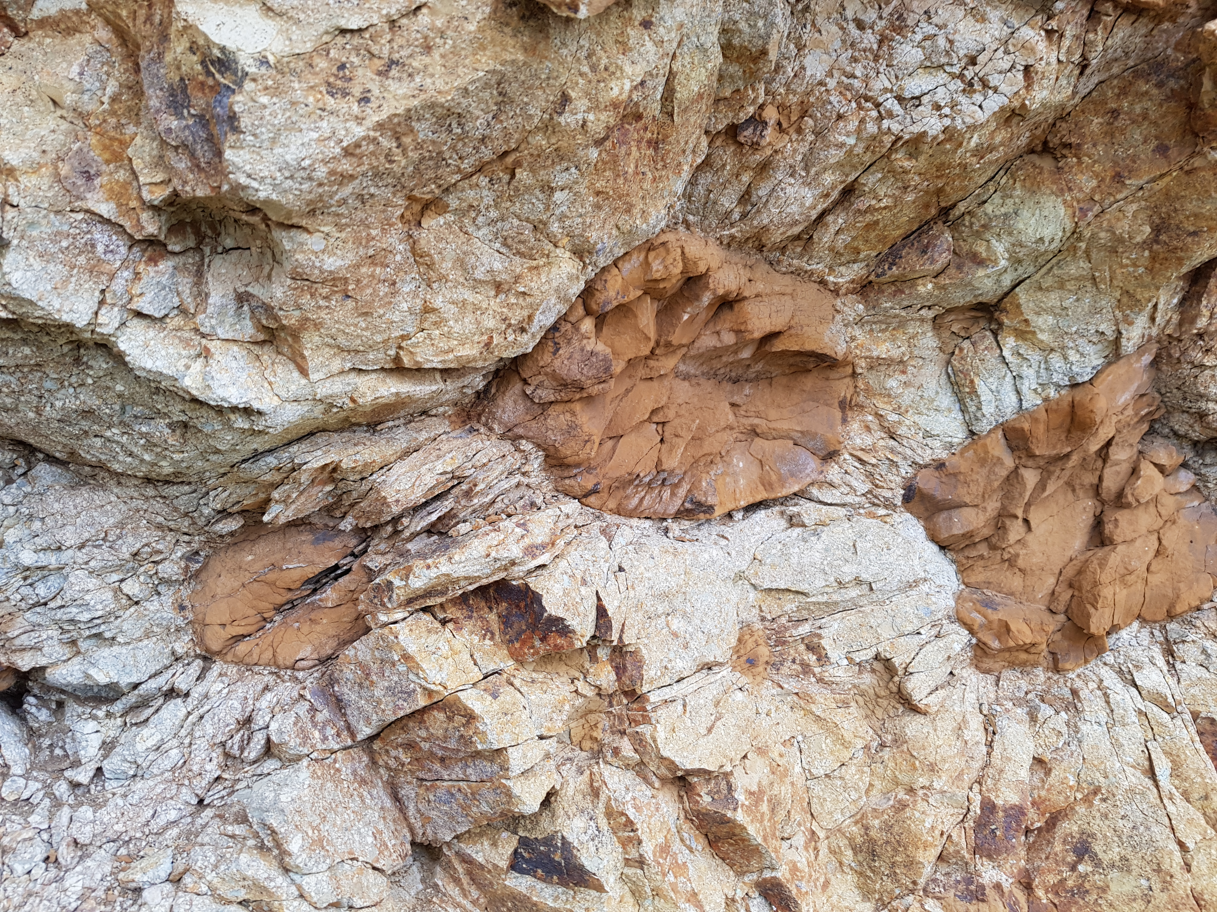 Několik kamenných sluncí viditelných na stěně